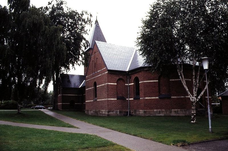 Vejen Kirke i Danmark. Vejen kirke